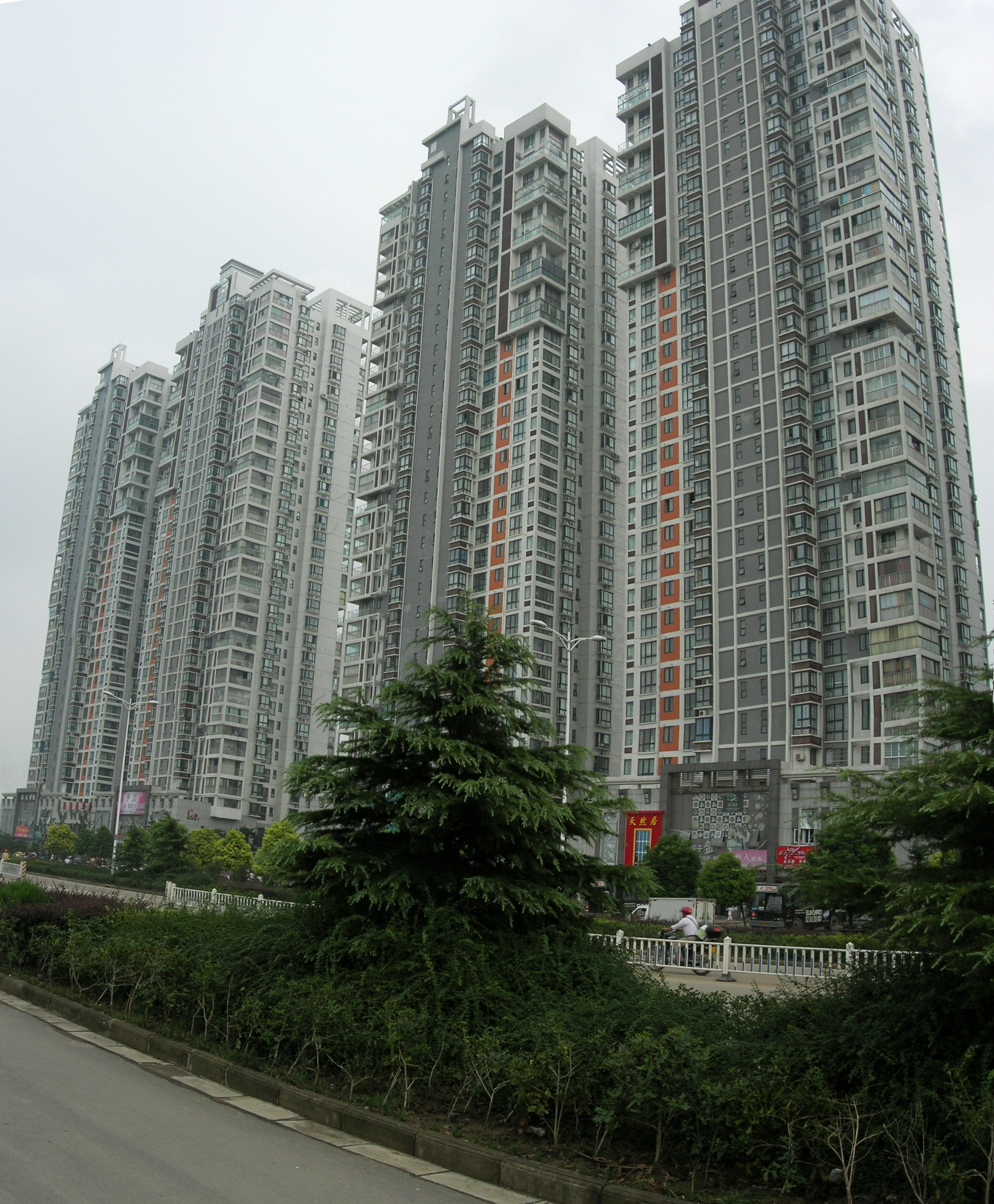 安徽省淮南市优山美地小区公寓楼